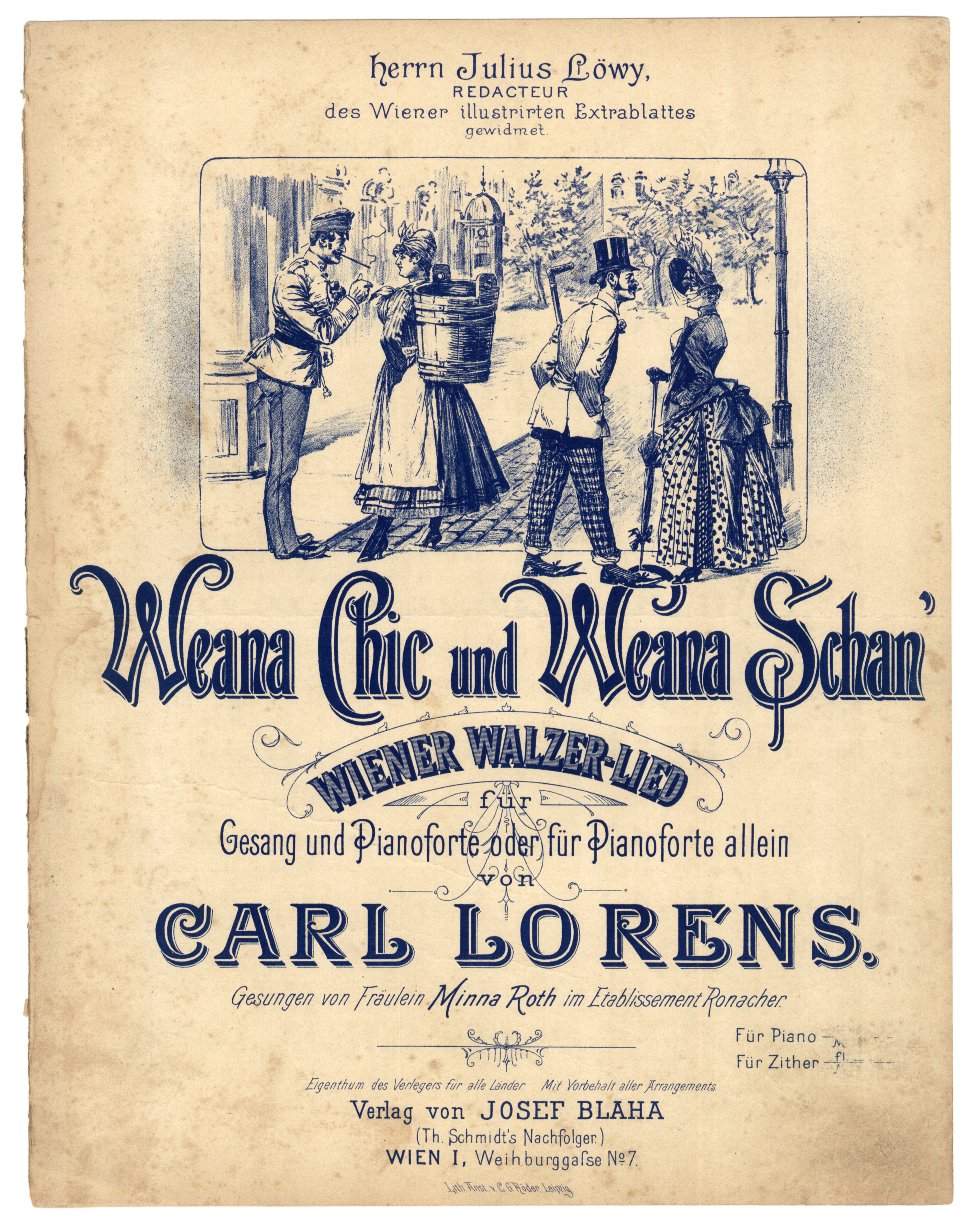 Carl Lorens Weana Chic Weana Schan, Titelblatt